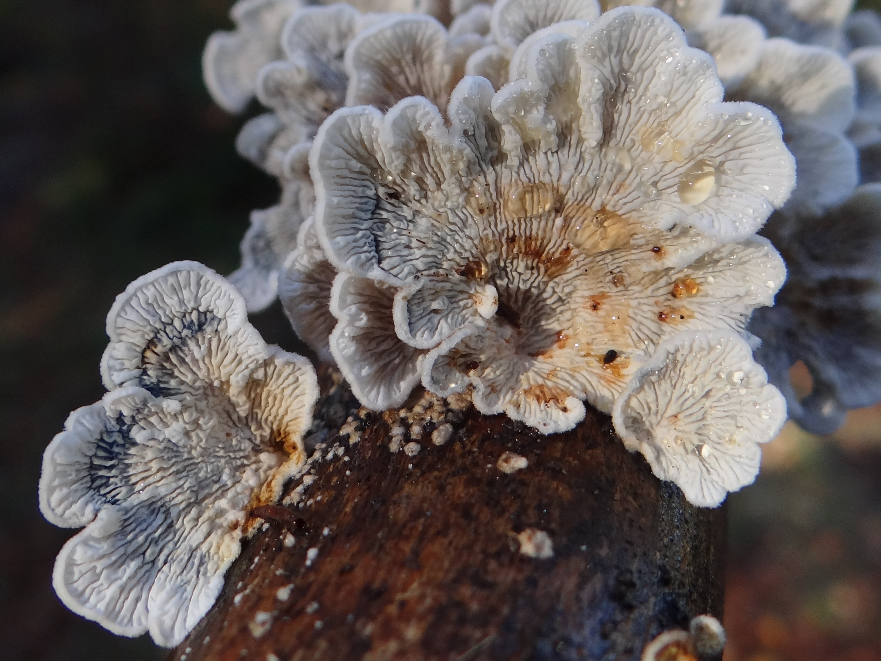 Plicaturopsis crispa (location:Poland, Kamionna (województwo małopolskie)